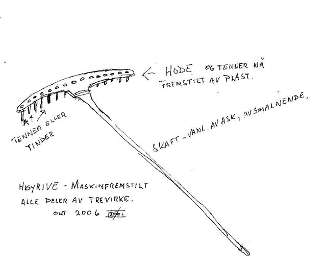 Høyrive av tre. Trerive industriframstilt etter annen verdenskrig. Egen tegning av dags dato.